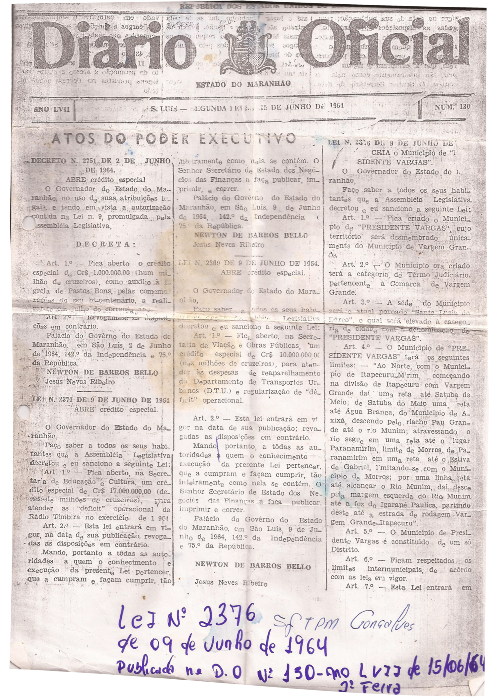 LEI Nº 2.376 de 9 de junho de 1964 Categoria:Leis Categoria:Diário Oficial Categoria:Documentos históricos